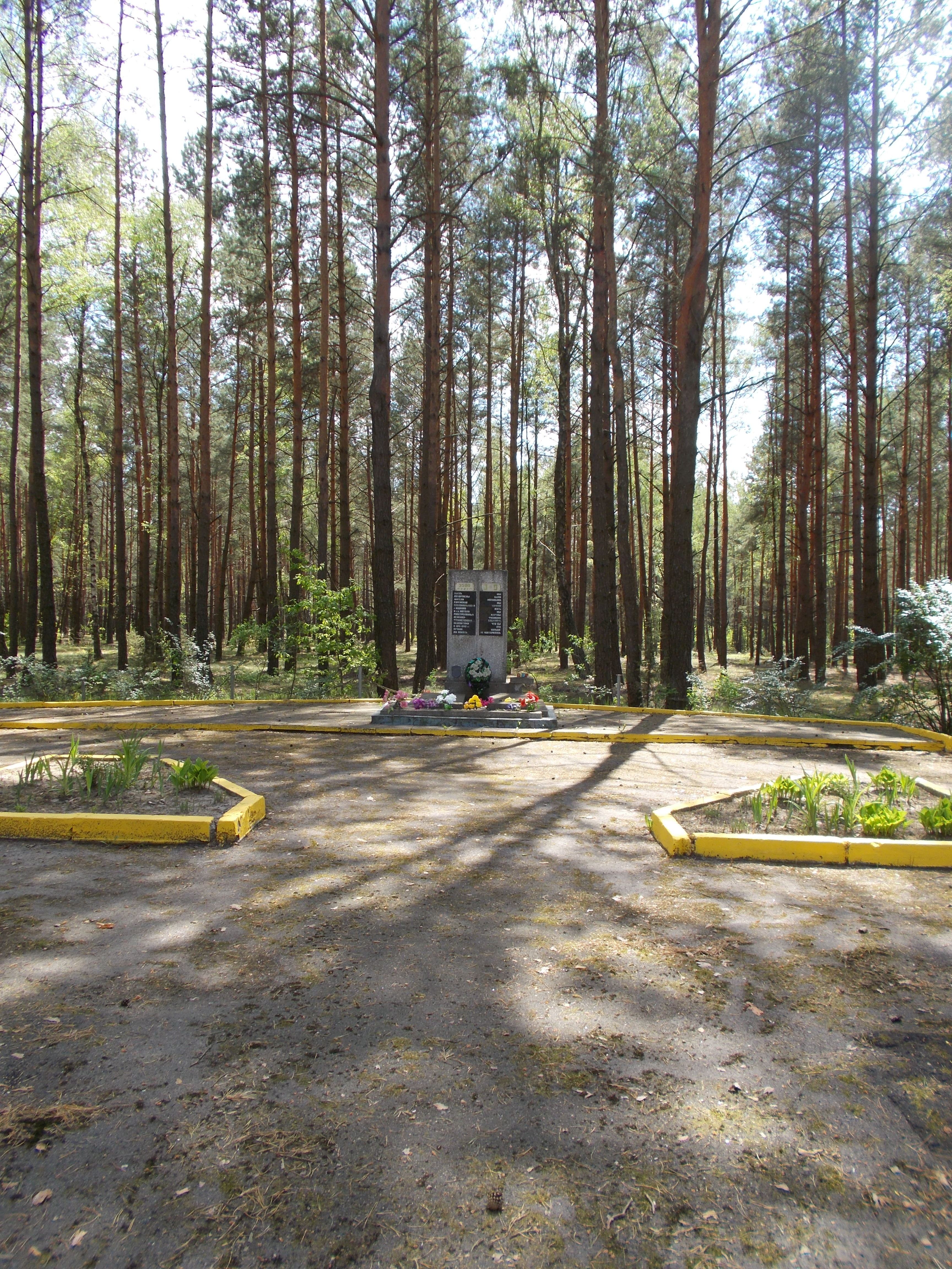 Мемориал на месте убийства нацистами и их пособниками 3500 евреев Иваново и Мотоля в 1941-1942 годах. Находится к югу от Иваново у дороги Р144 (выезд из Иваново по улице Ленина - в двух километрах от города или в трёх километрах от железной дороги) перед деревней Рудск - в 20 метрах справа от дороги.